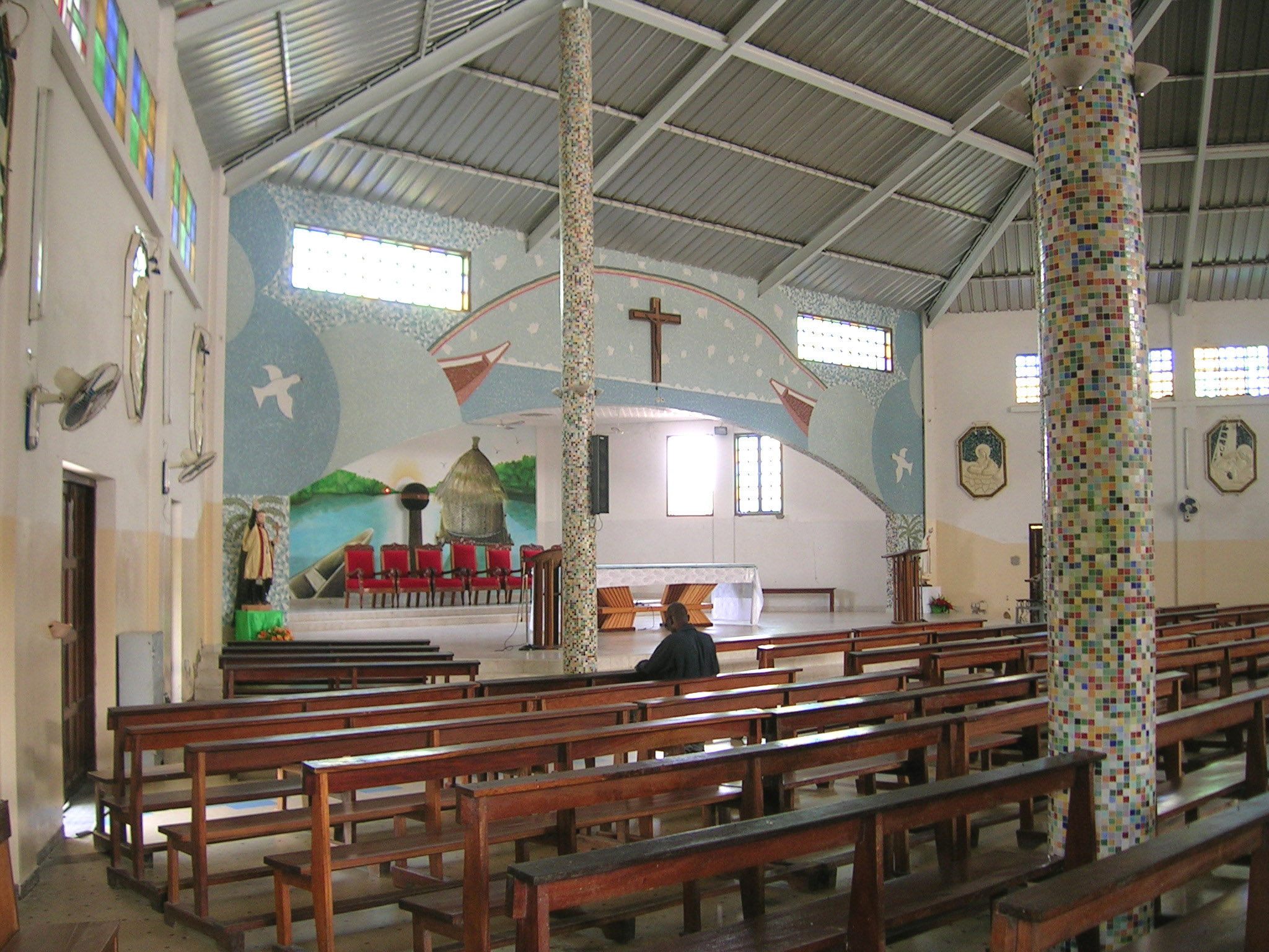 Intérieur de l'église de Fadiouth (Sénégal)